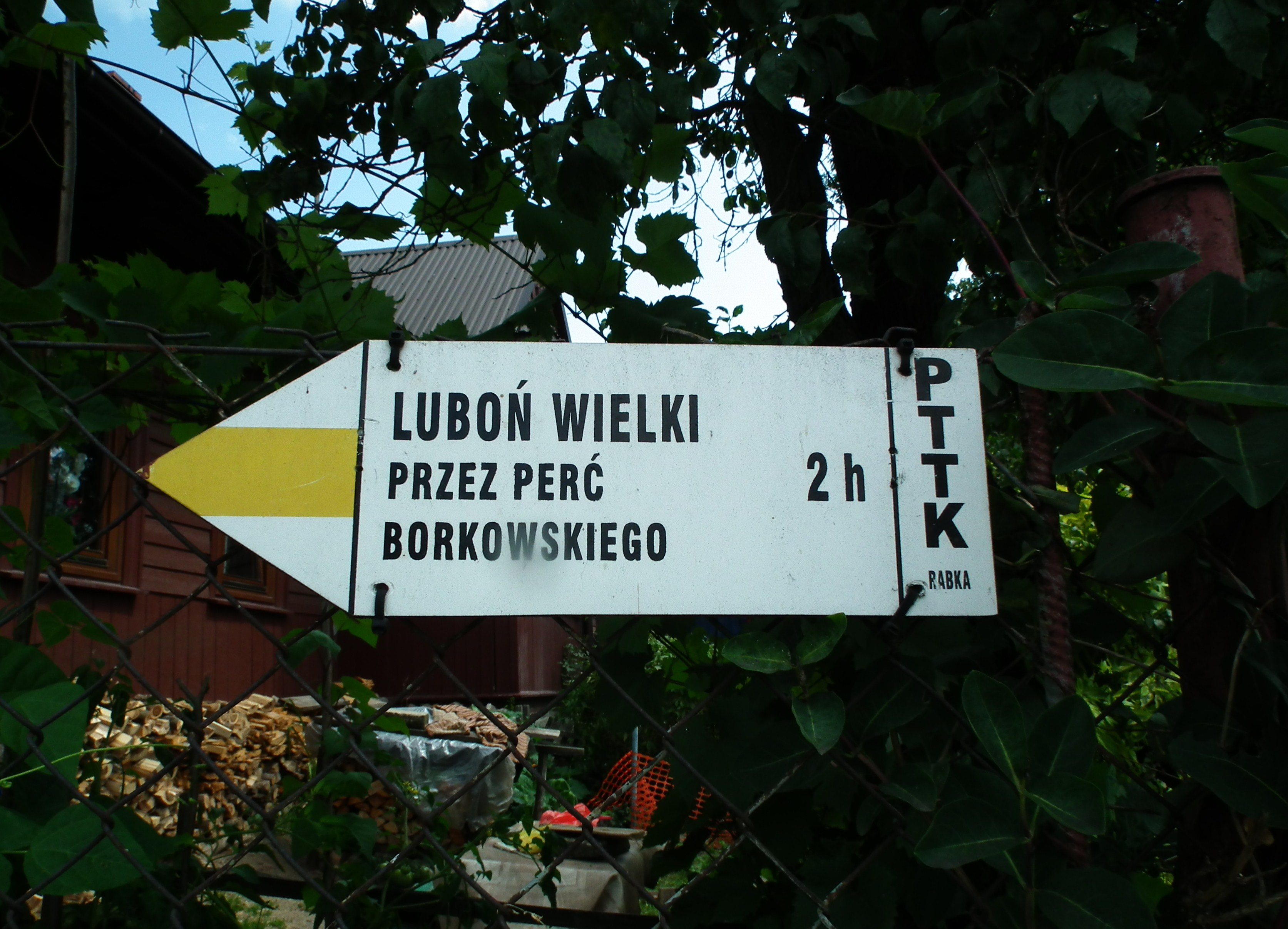 Perć Borkowskiego z Rabki Zarytego na Luboń Wielki.